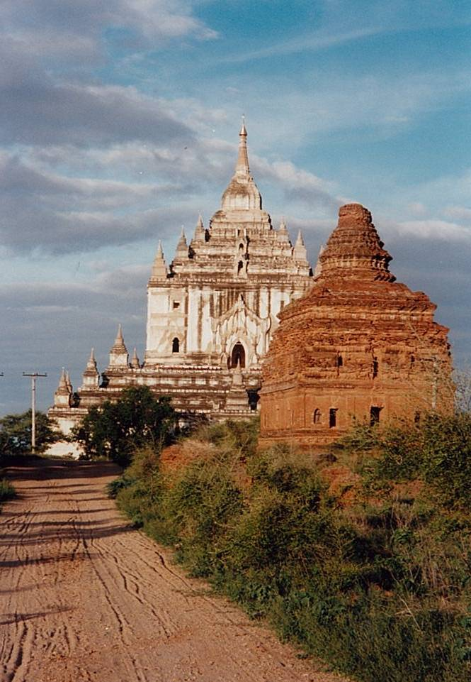 Ruïne van boeddhistische tempels in Pagan, Myanmar. Foto door Peter Prevos (1994)